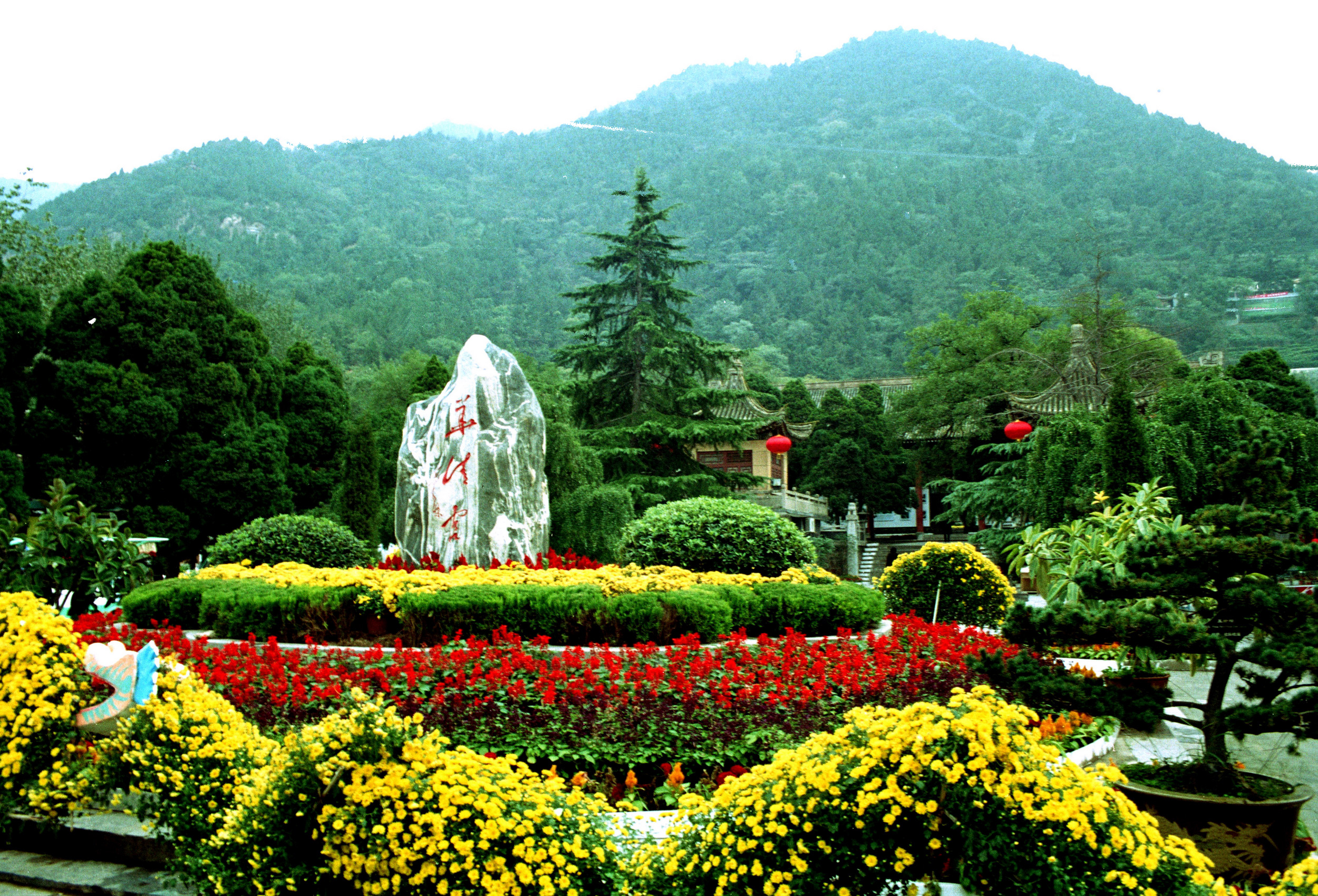 华清宫